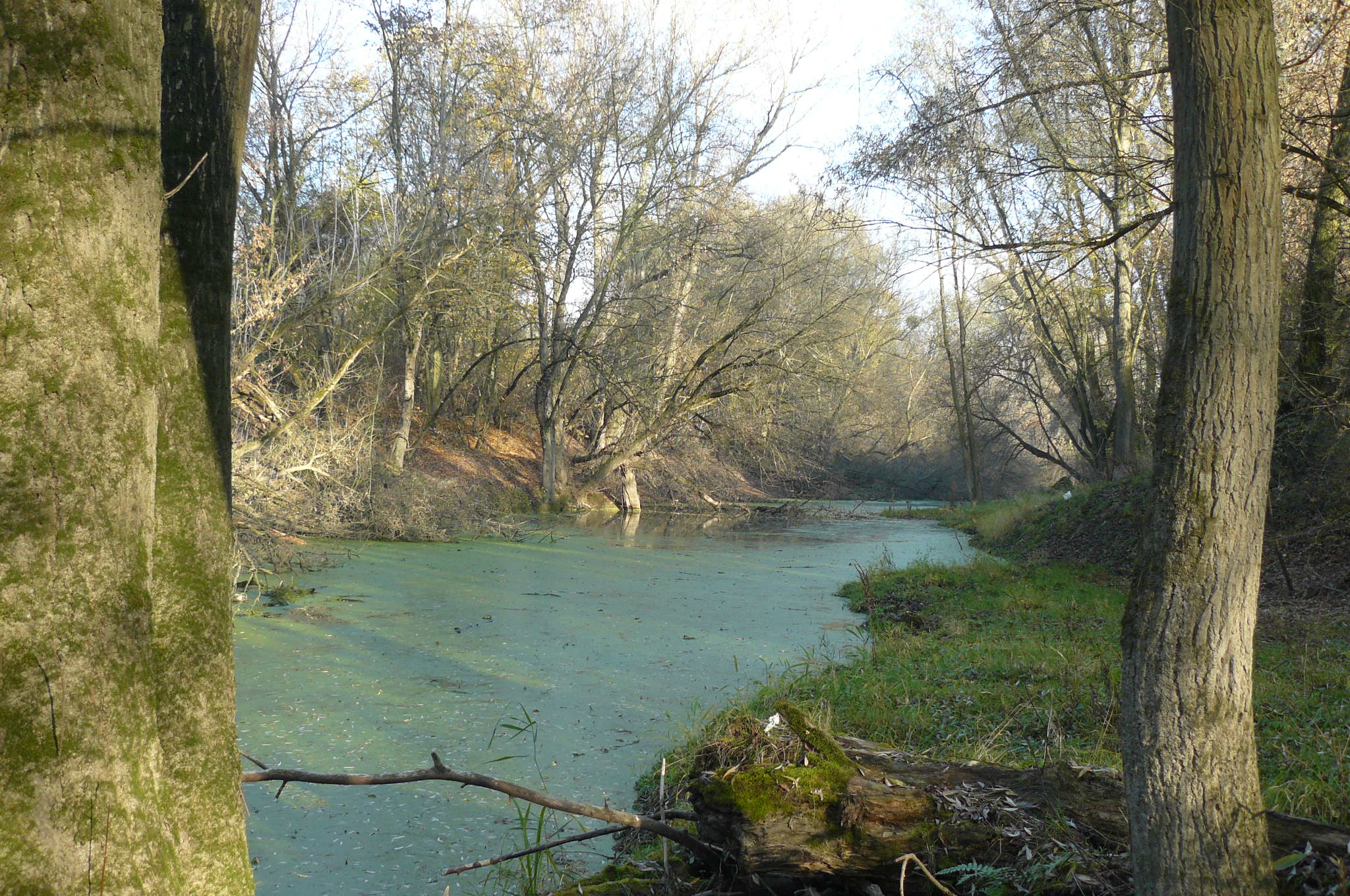 Kępa Bazarowa i Mała Wisełka w Toruniu - okolice dworca głównego.